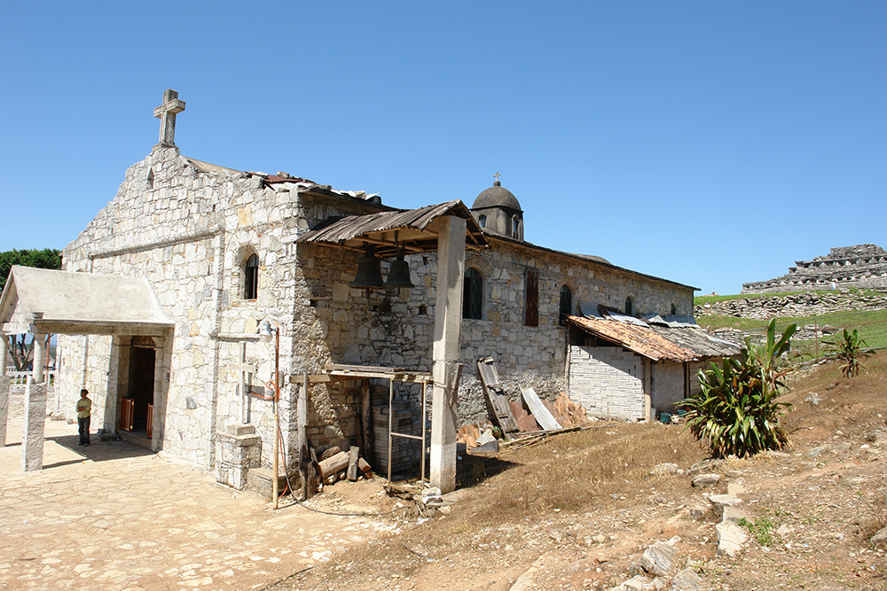 Yohualichan